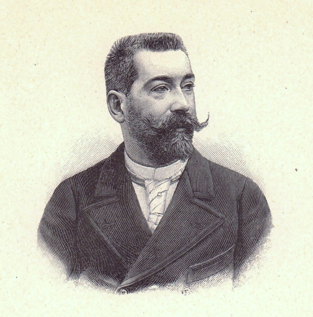 Paul Chocarne-Moreau, portrait gravé, auto-portrait ou auteur inconnu. Le Petit Journal, 1902. 26 x 16 cm.